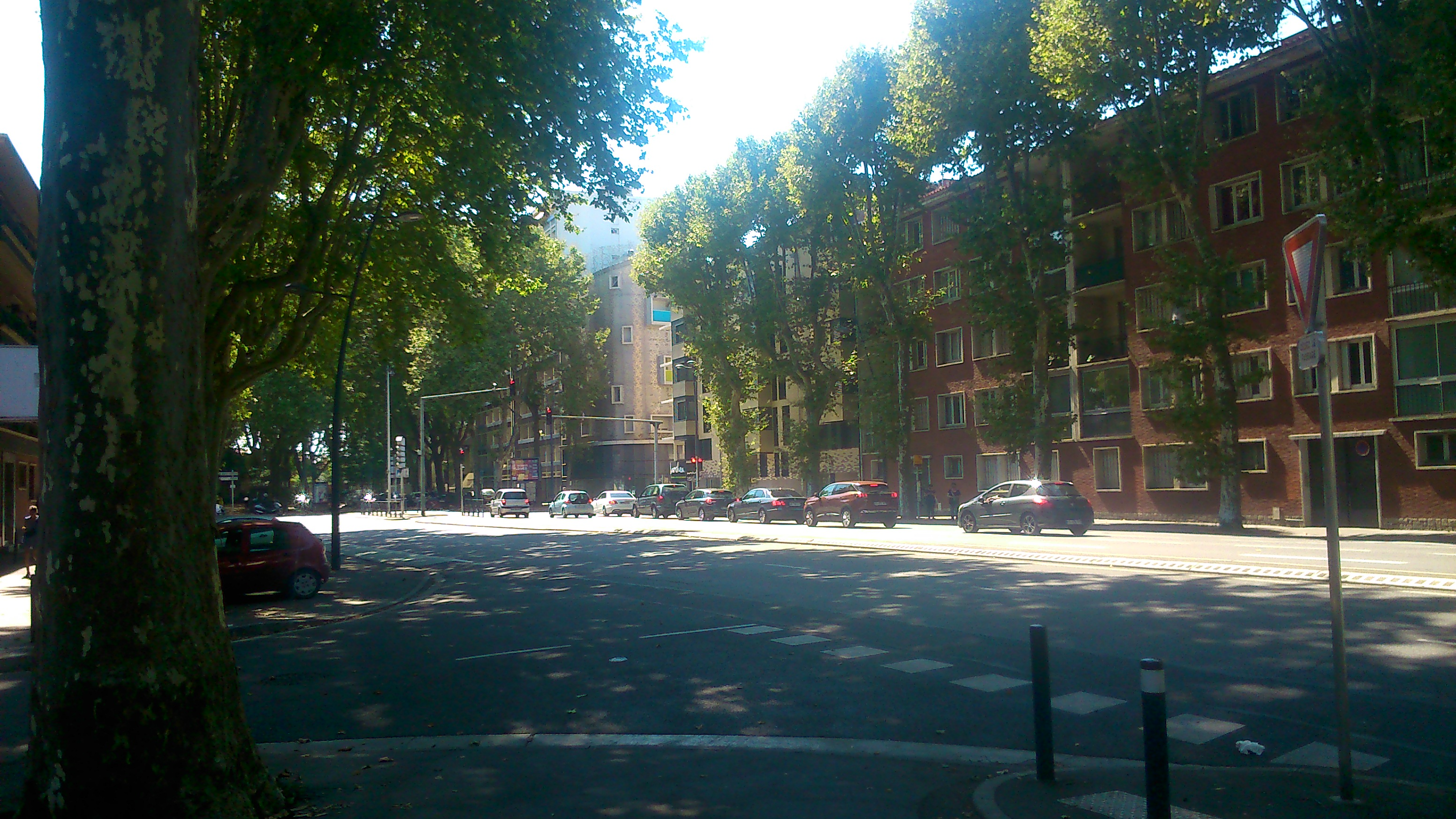 Le boulevard Lascrosses à Toulouse